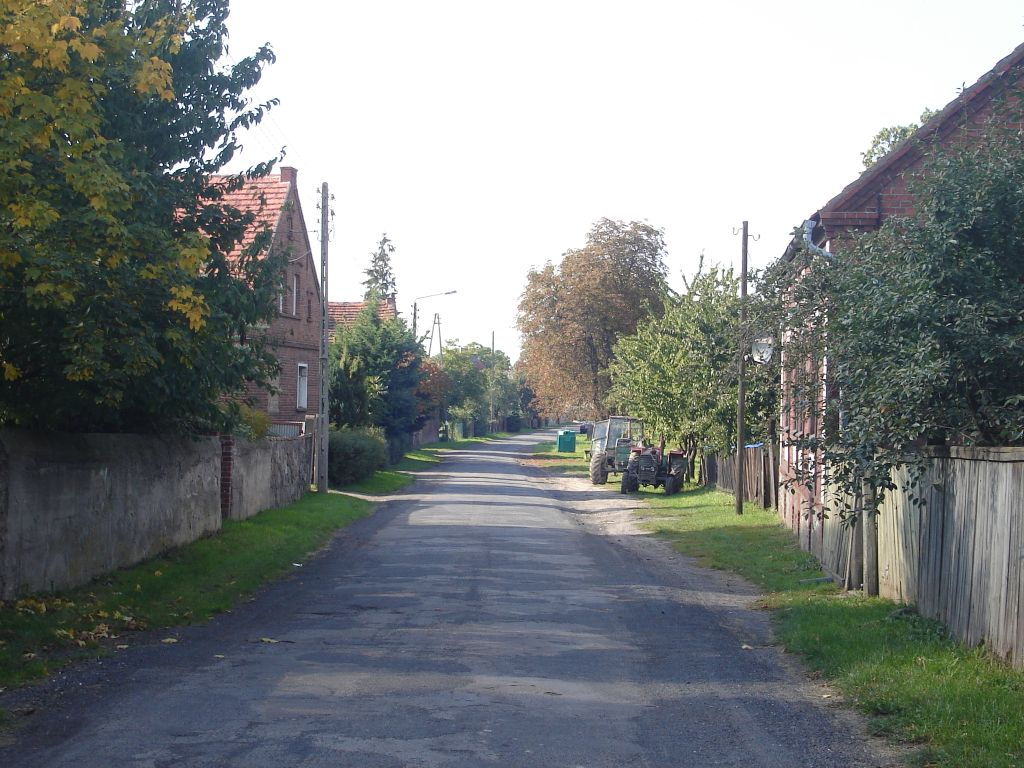 Główna droga w Wolimirzycach